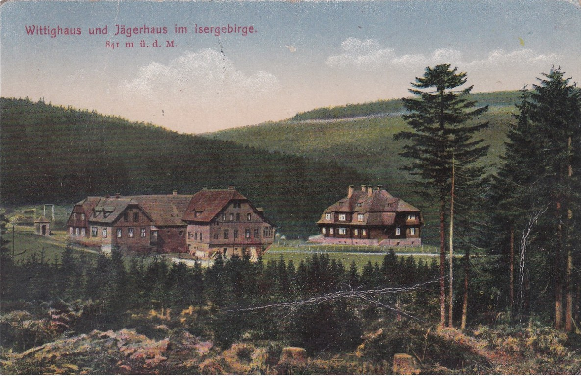 Horská chata (vlevo) a lovecký zámeček (vpravo) na Smědavě pravděpodobně v roce 1910).